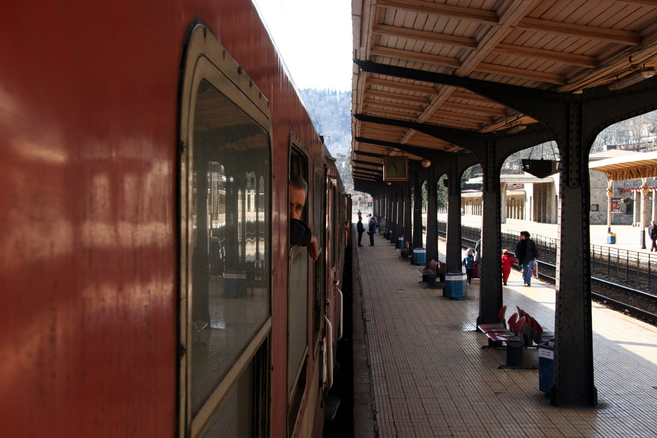 Train en gare de Sinaia (direction Brasov)